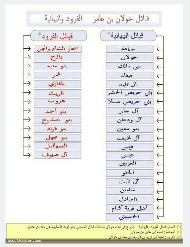 اليهنوي هو بطن من بطون قبيلة خولان بن عامر